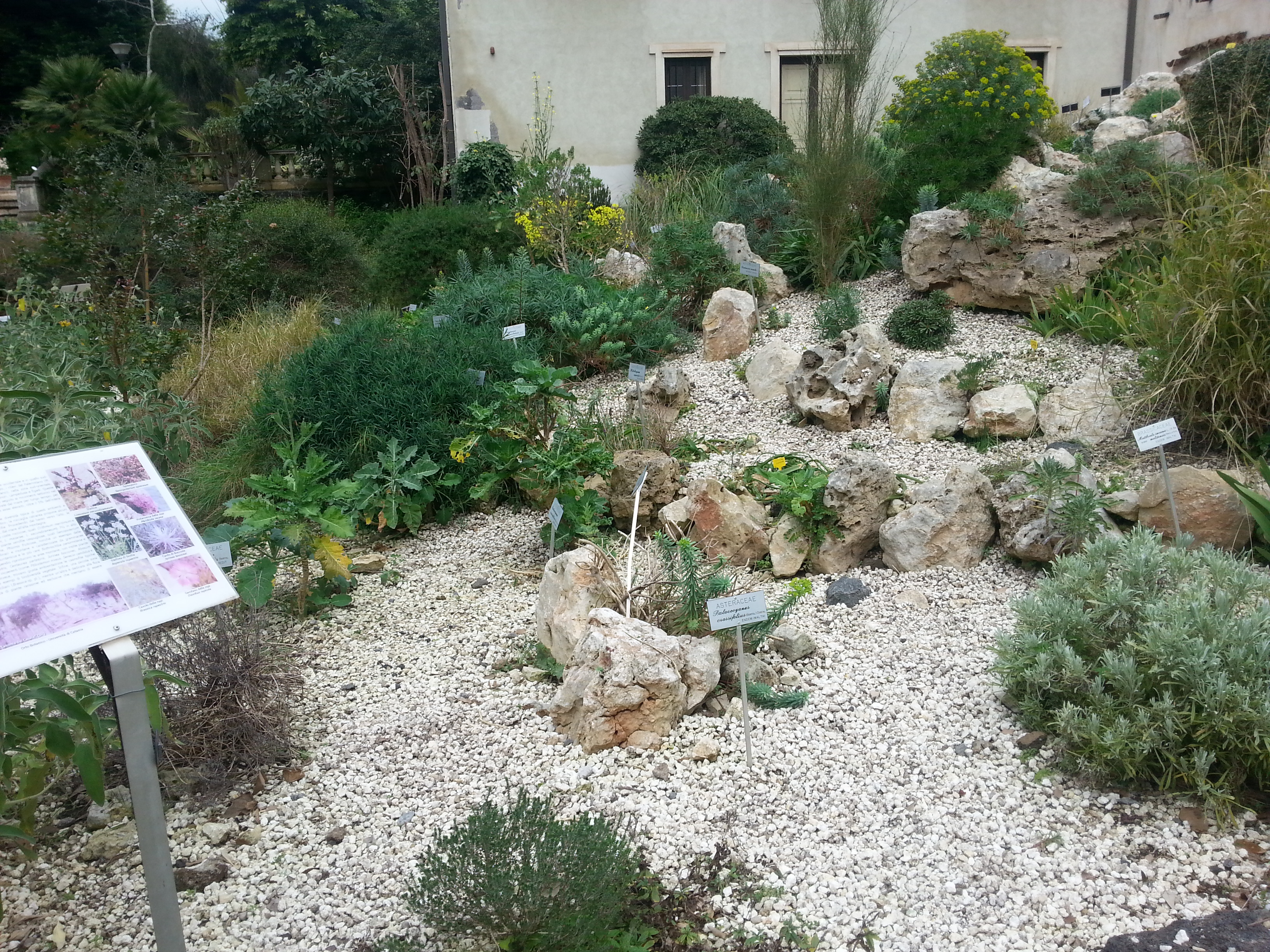 Orto botanico di Catania Orto siculo